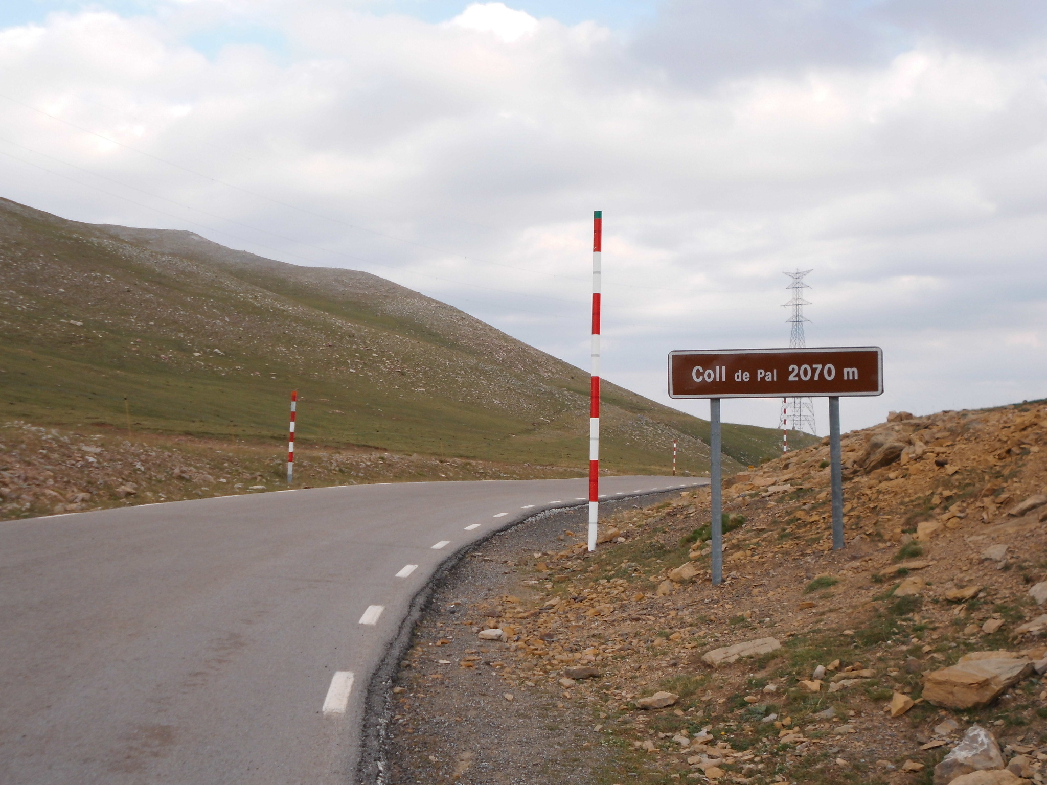 Coll de Pal (Bagà)